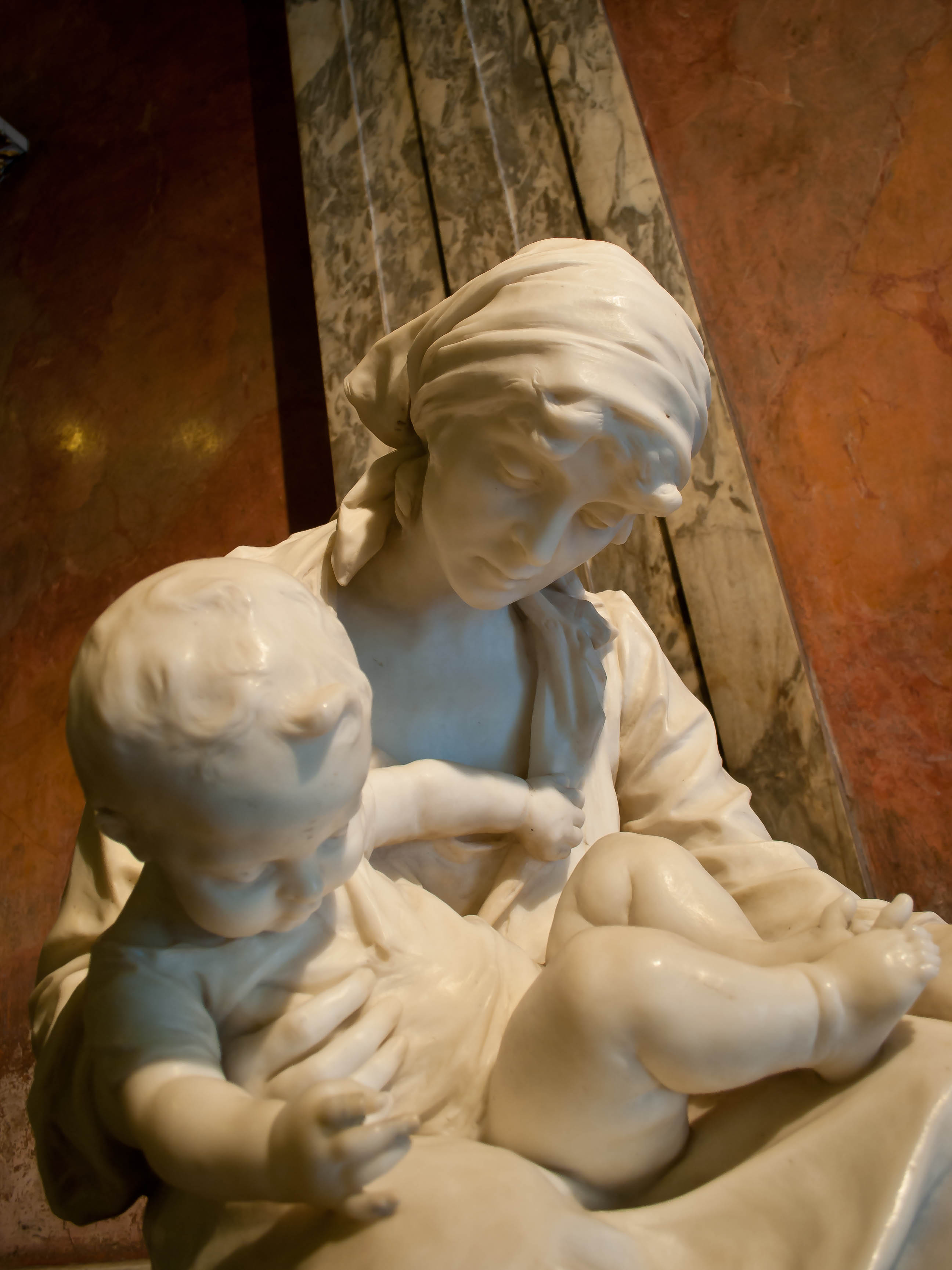 "Los héroes de la miseria", de Juan Ramón Bonilla. Mármol. 1908. Teatro Nacional de Costa Rica.